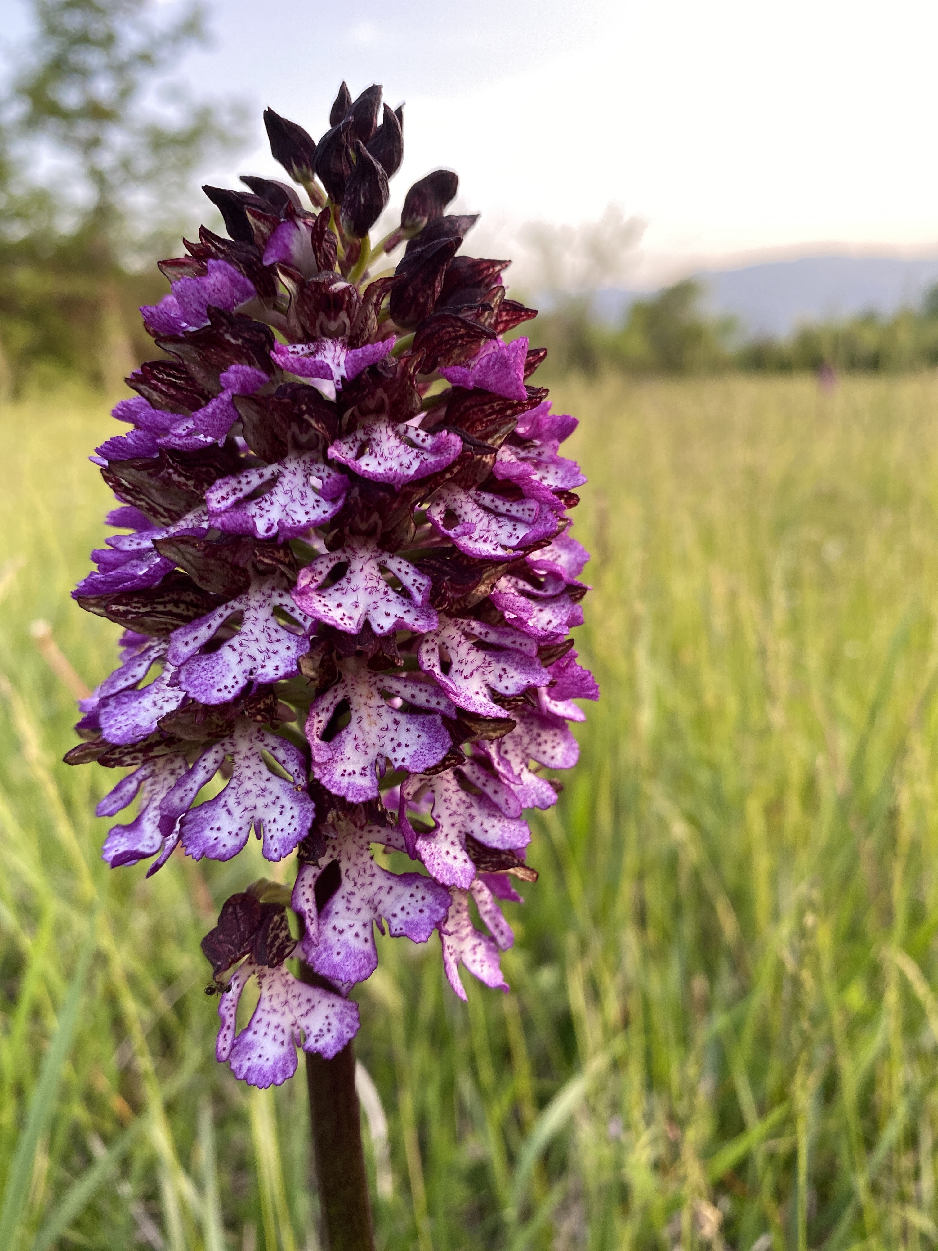 Orchis purpurea, Orchide Maggiore by Francesco Scelsa